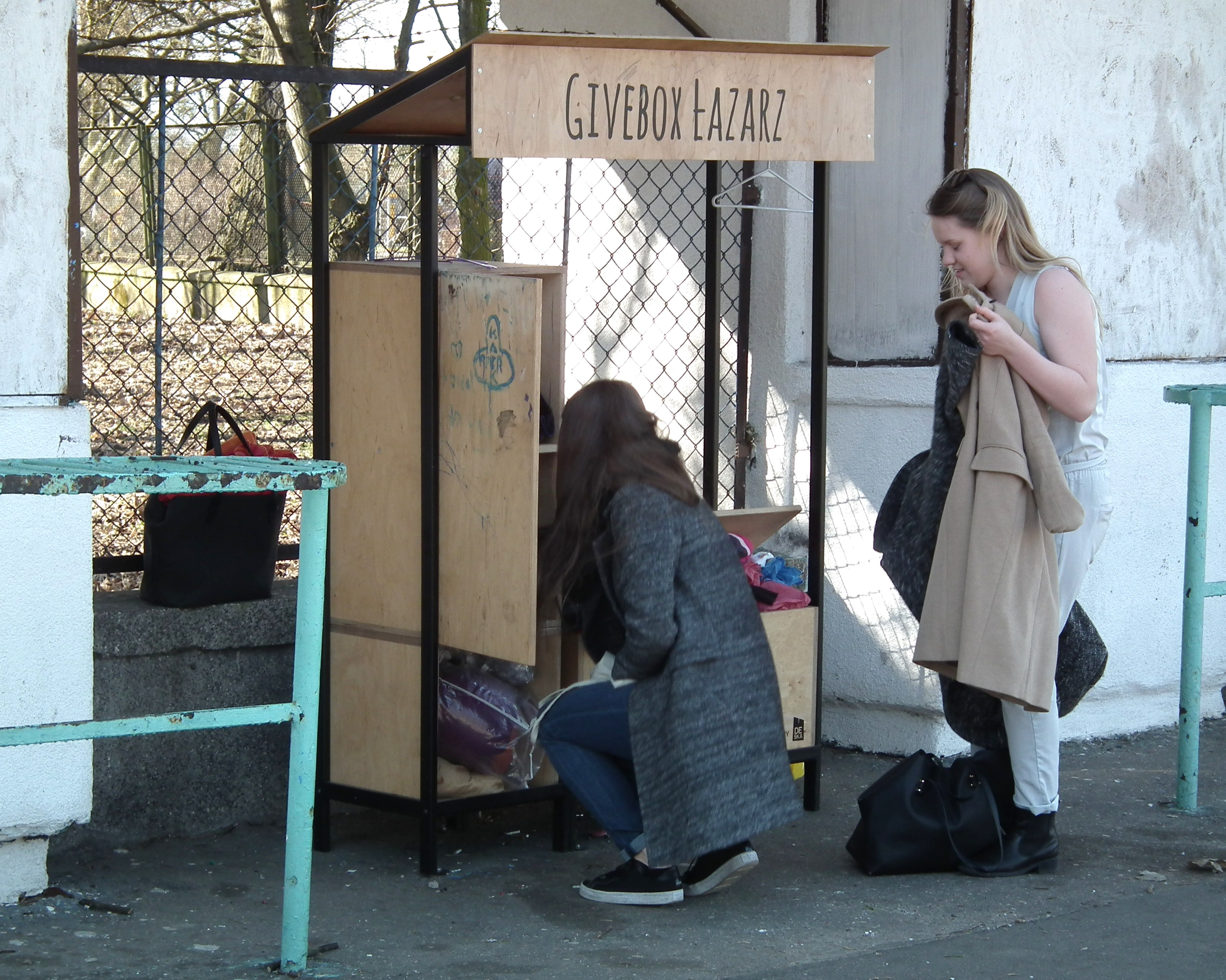 Givebox w Poznaniu - przy Arenie.